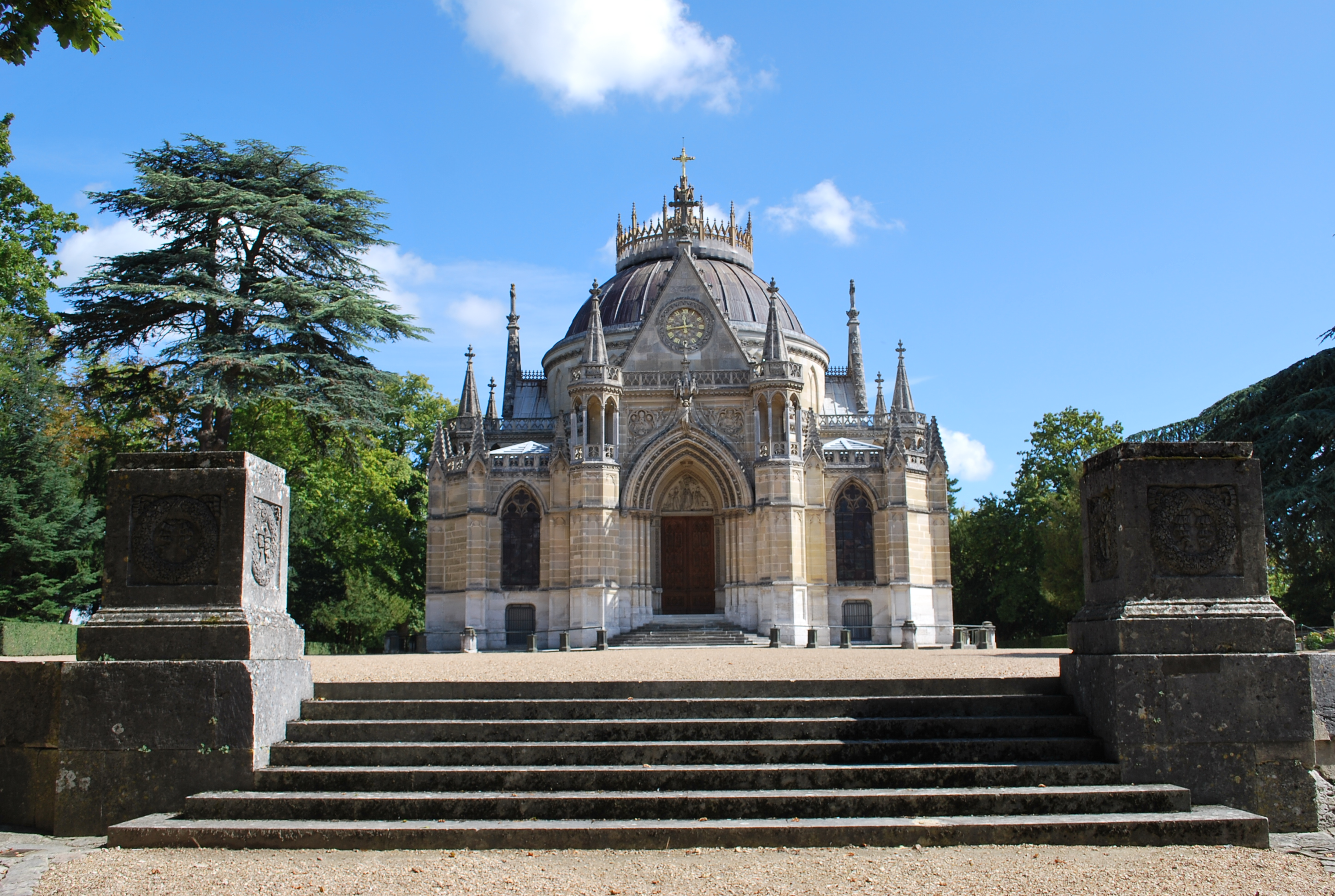 domaine de la chapelle royale Saint-Louis, Dreux, Eure-et-Loir (France). .